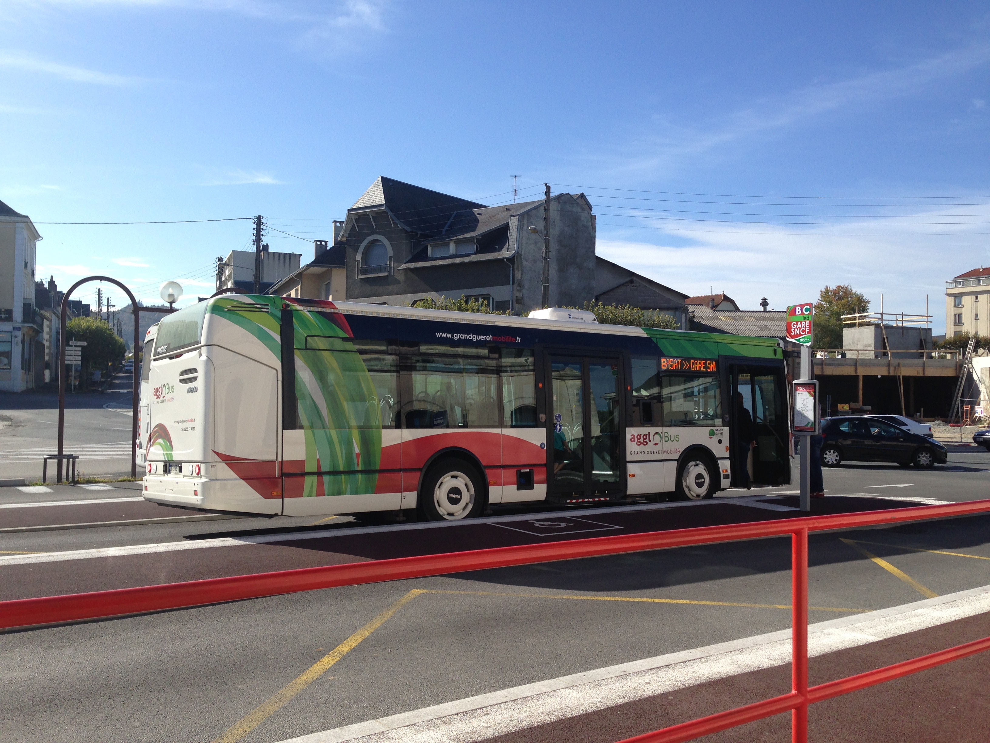 un bus à Guéret